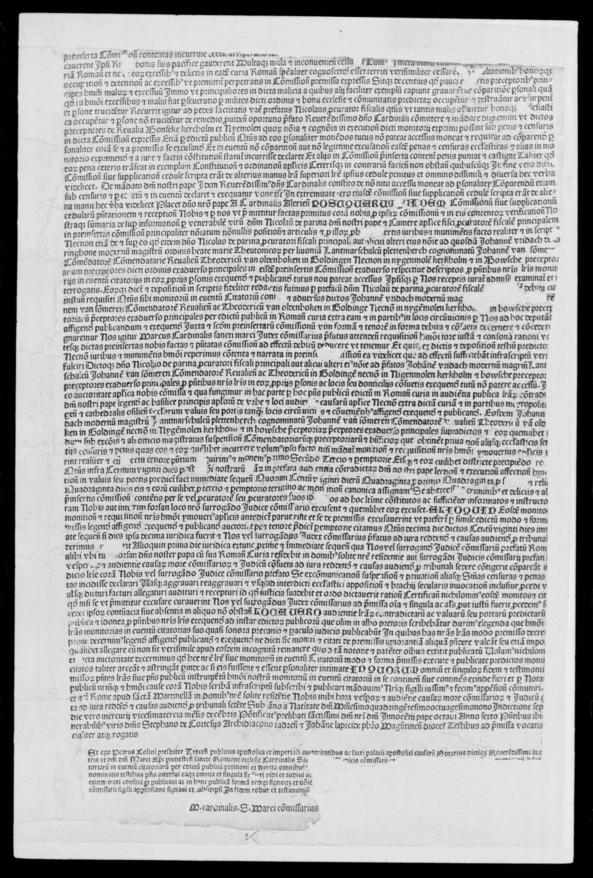 Carta